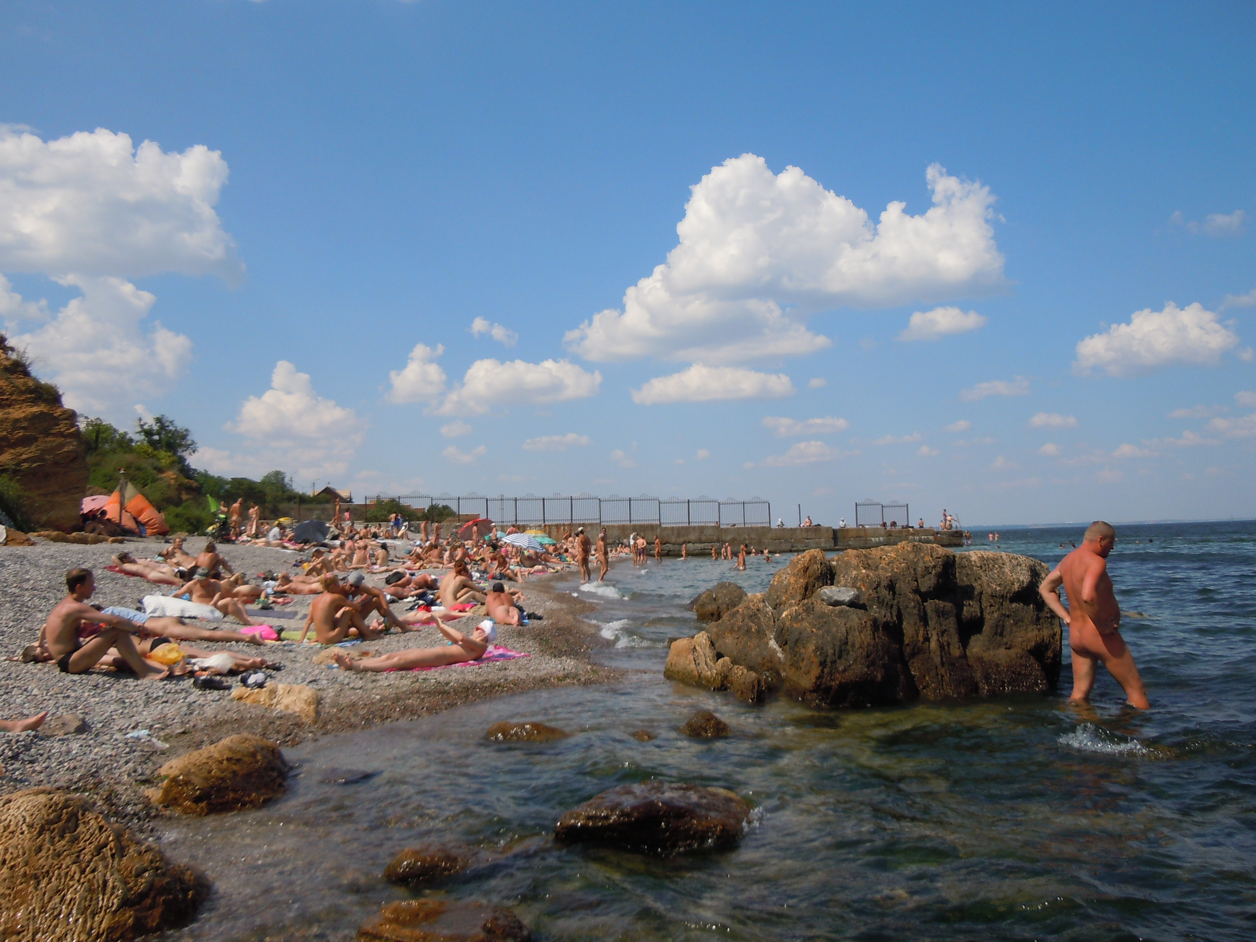 Дикий пляж в Одесі